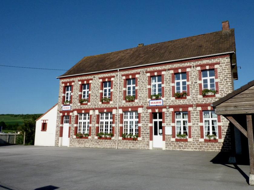 Mairie et École du village